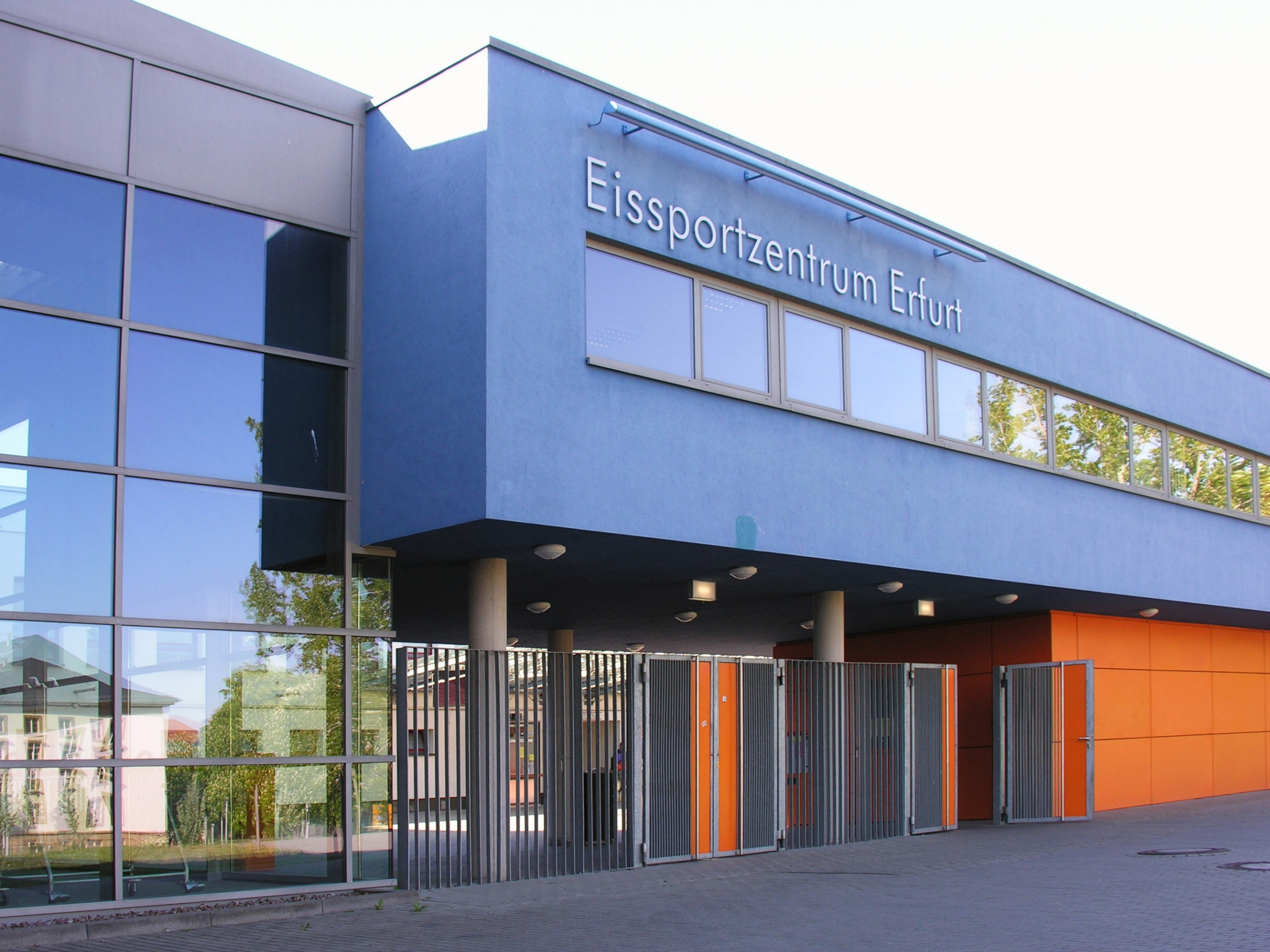 Eissportzentrum Gunda-Niemann-Stirnemann-Halle mit 400 m Eisbahn, Erfurt Thüringen - Foto Wolfgang Pehlemann Steinberg Ostsee DSCN1555.jpg